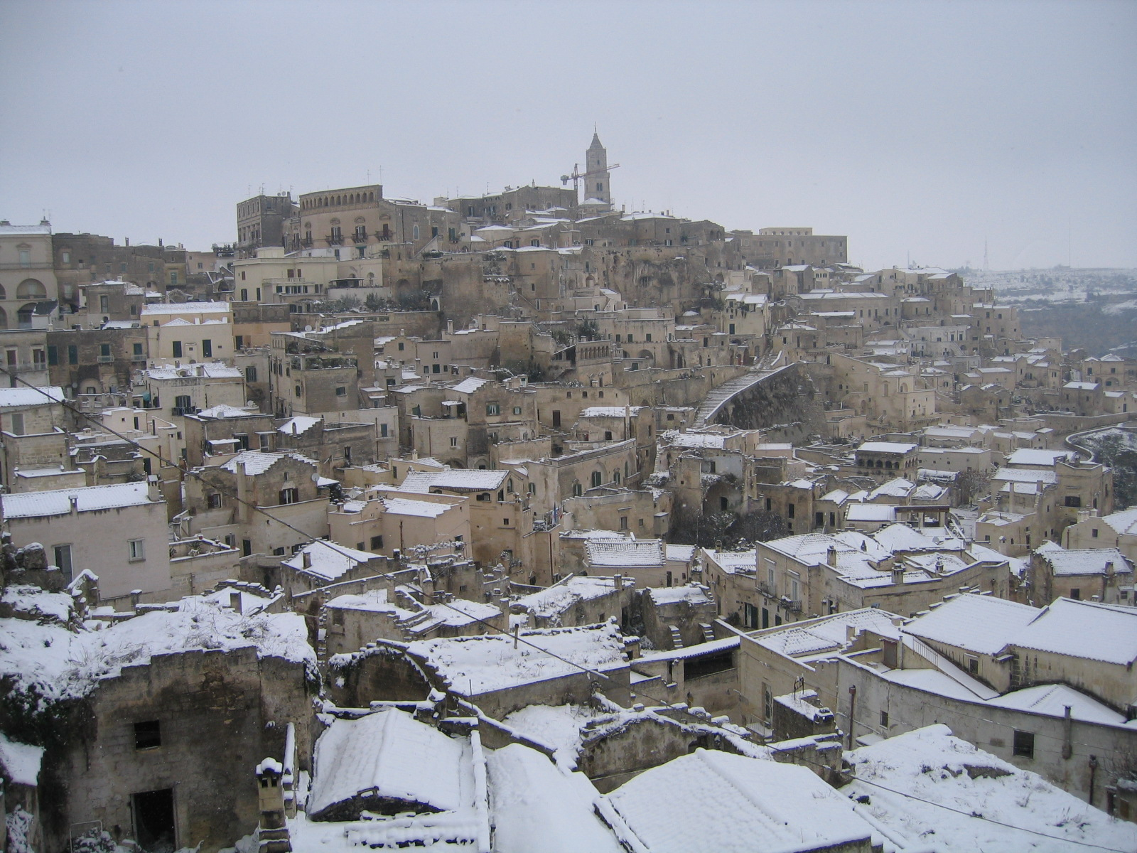 Sassi di Matera innevati